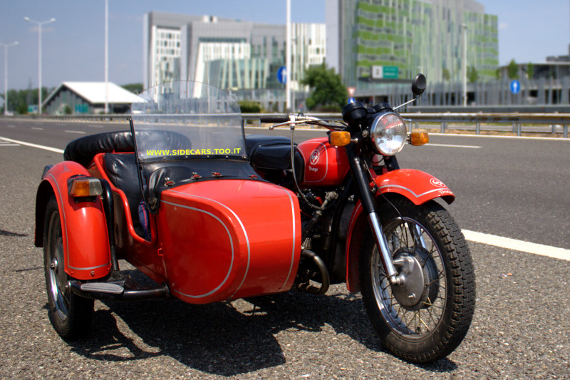 Sidecar Dnepr MT-10 del 1978